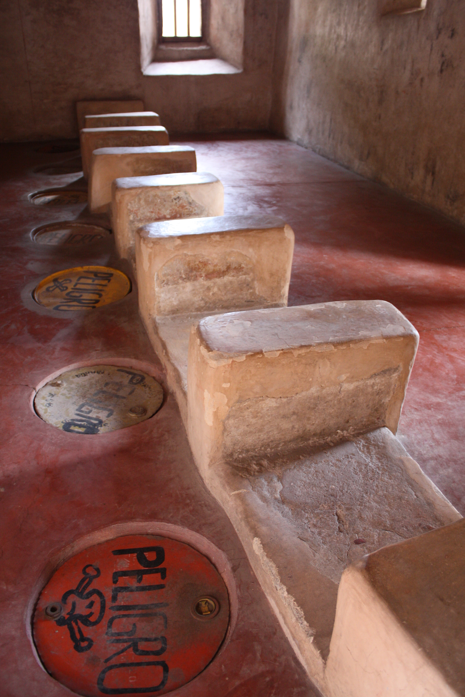 Convento de Actopan